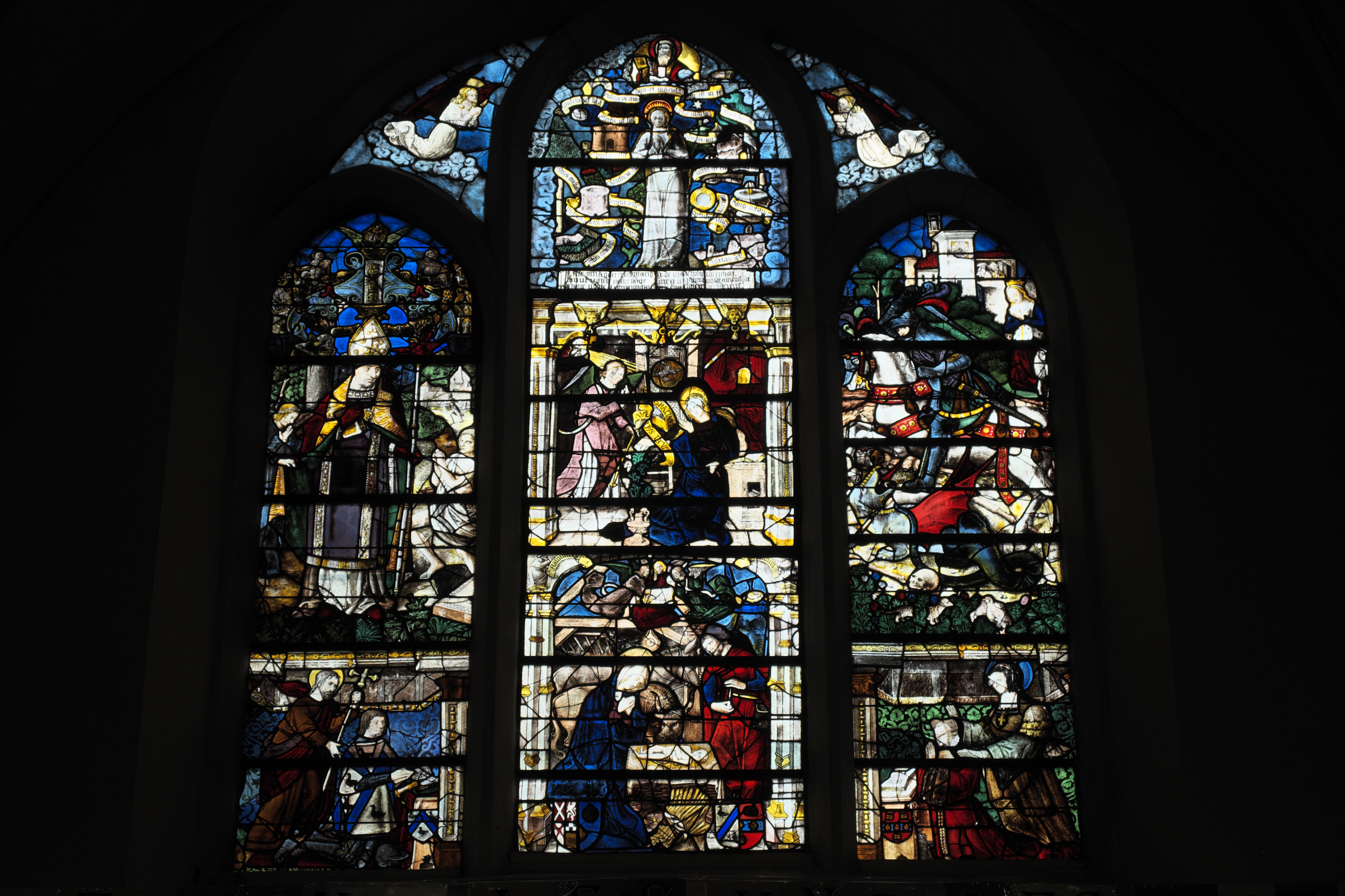 Katholische Pfarrkirche Notre-Dame-de-l’Assomption in Marolles-en-Hurepoix im Département Essonne (Region Île-de-France/Frankreich), Bleiglasfenster (Marienfenster) im Chor aus dem 16. Jahrhundert; Darstellung: Verkündigung und Geburt Jesu (Mitte), links ein Bischof, rechts heiliger Georg, unten Stifter mit Schutzpatronen